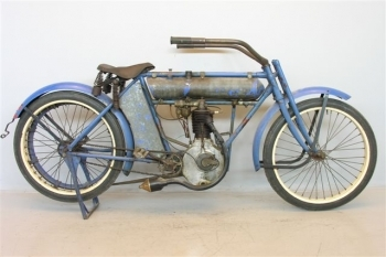 Yale motorcycle 473 cc 1911